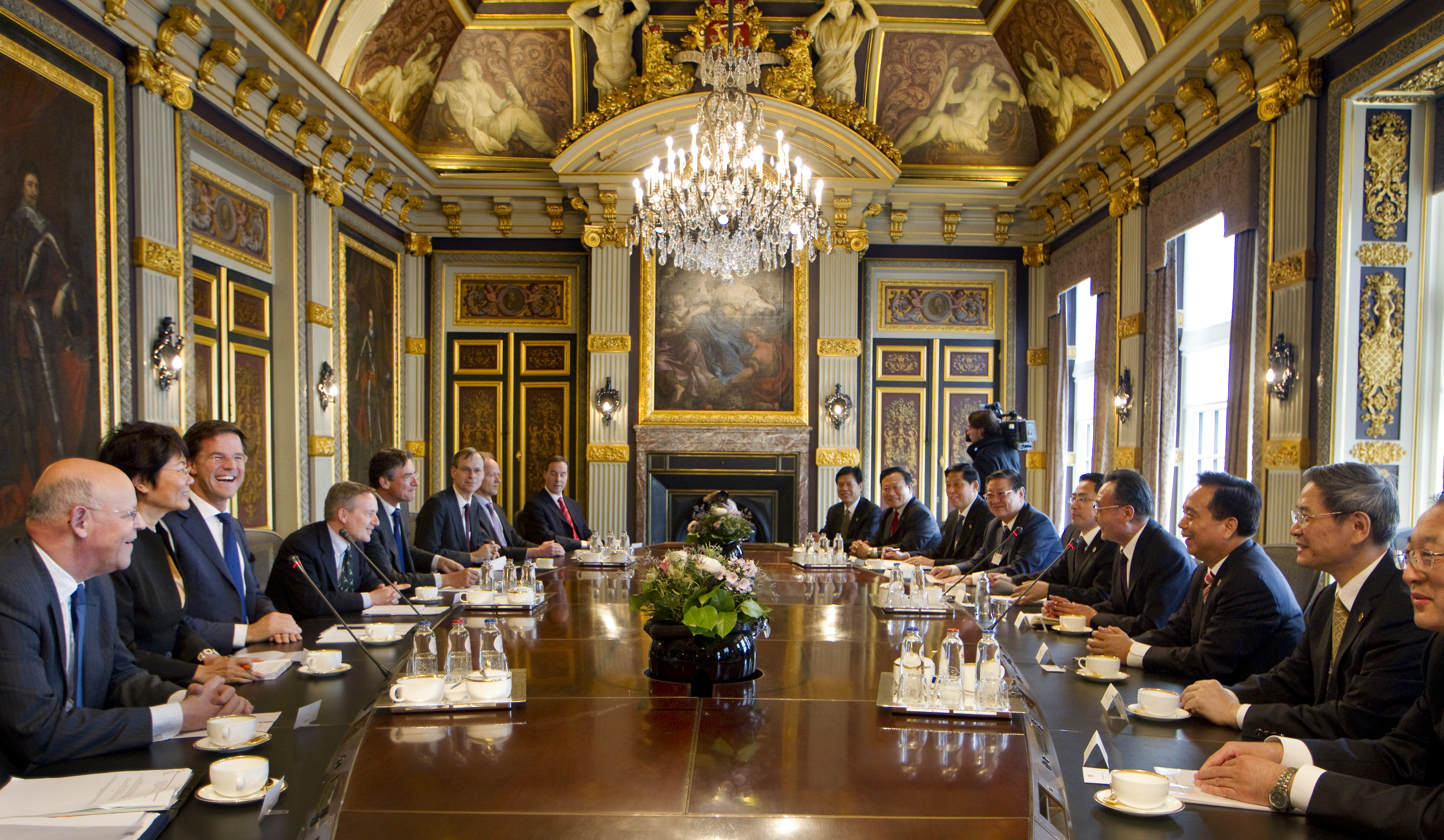 Minister-president Rutte ontvangt de heer Wu Bangguo, voorzitter van het Permanent Comité van het Nationale Volkscongres China, in de Trêveszaal. Bij deze ontmoeting zijn ook minister Verhagen van Economische Zaken, Landbouw en Innovatie en minister Rosenthal van Buitenlandse Zaken aanwezig. Op de agenda staan onder meer de politieke en economische betrekkingen. De voorzitter van het Permanent Comité van het Nationale Volkscongres China is in Nederland op uitnodiging van de voorzitters van de Eerste en Tweede Kamer der Staten-Generaal. Hij is uitgenodigd naar aanleiding van de 40 jaar bilaterale banden tussen Nederland en China.